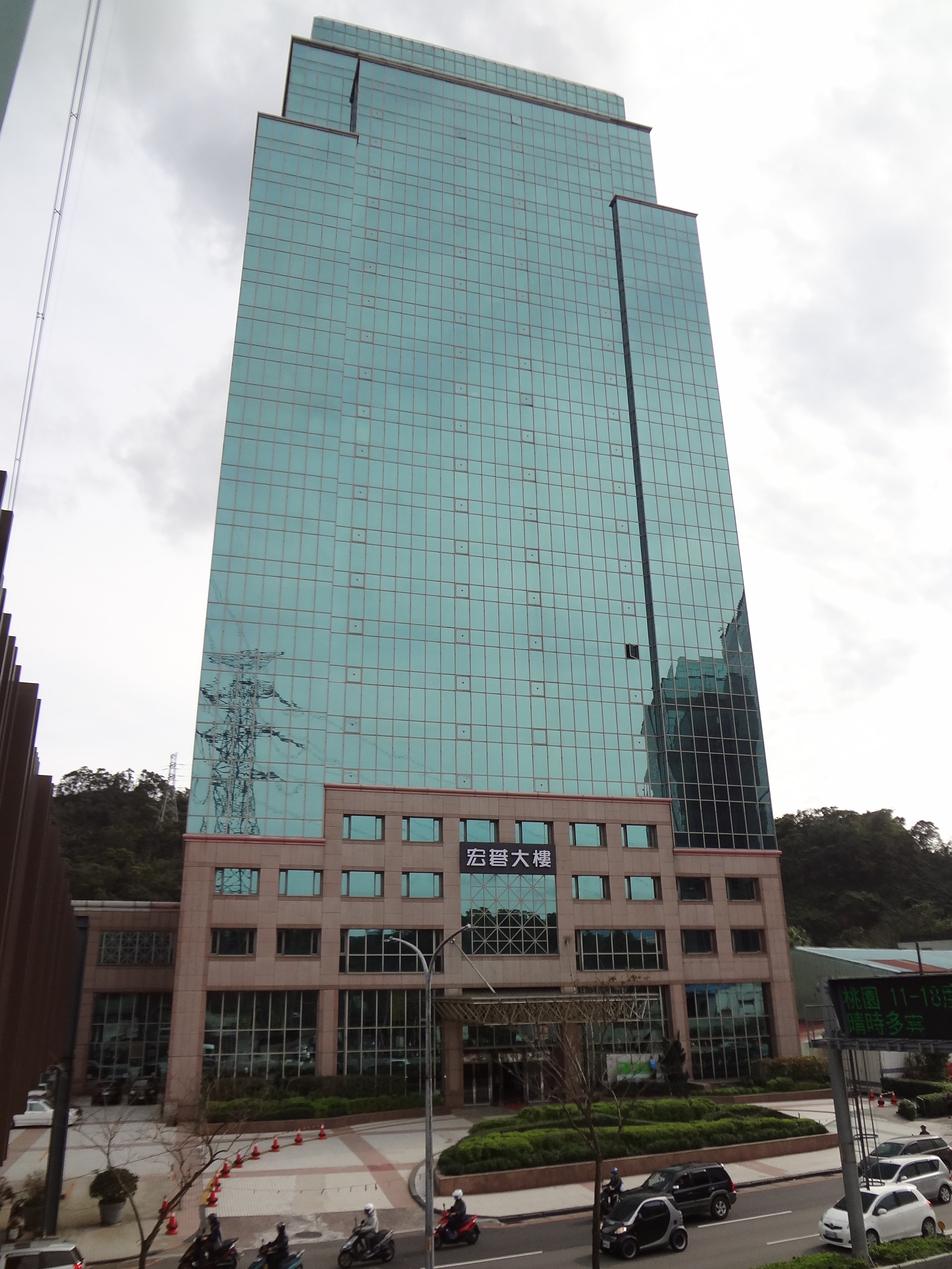 東方科學園區宏碁大樓，位於臺灣新北市汐止區新台五路一段82、84、86、88號。